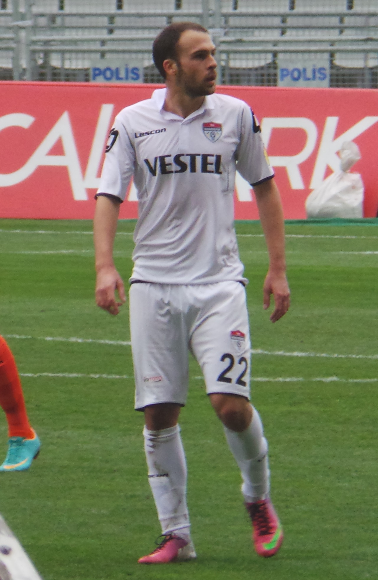 Slavko Perović